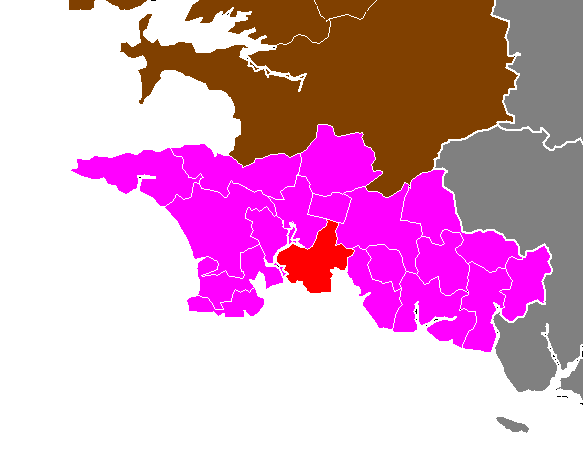 Maps of arrondissements and cantons of France: Arrondissement de Quimper - Canton de Fouesnant.PNG (Département du Finistère , Arrondissement de Quimper)